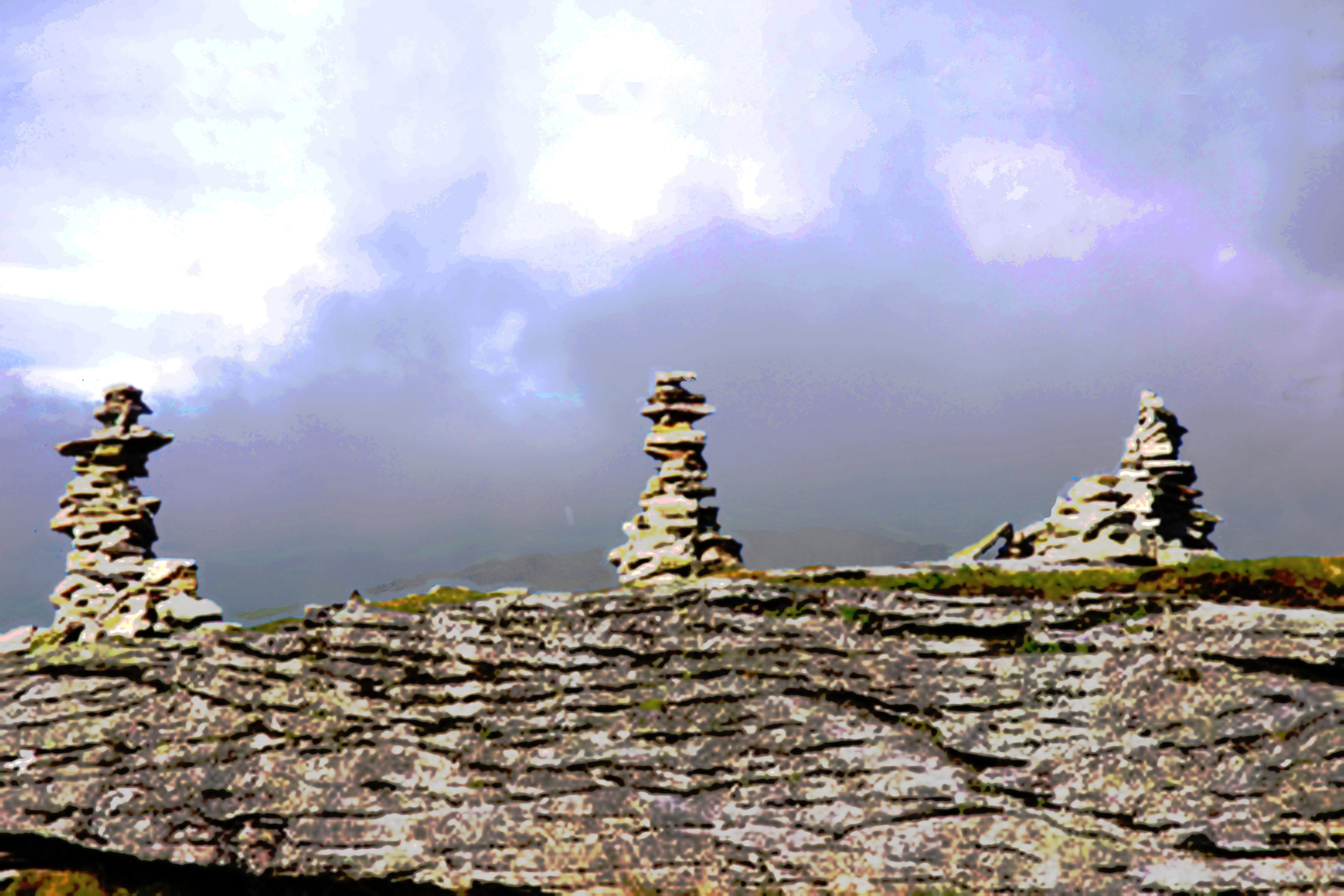 Les trois montjoies marquant l'emplacement de l'ancienne basilique de la Très Sainte Trinité